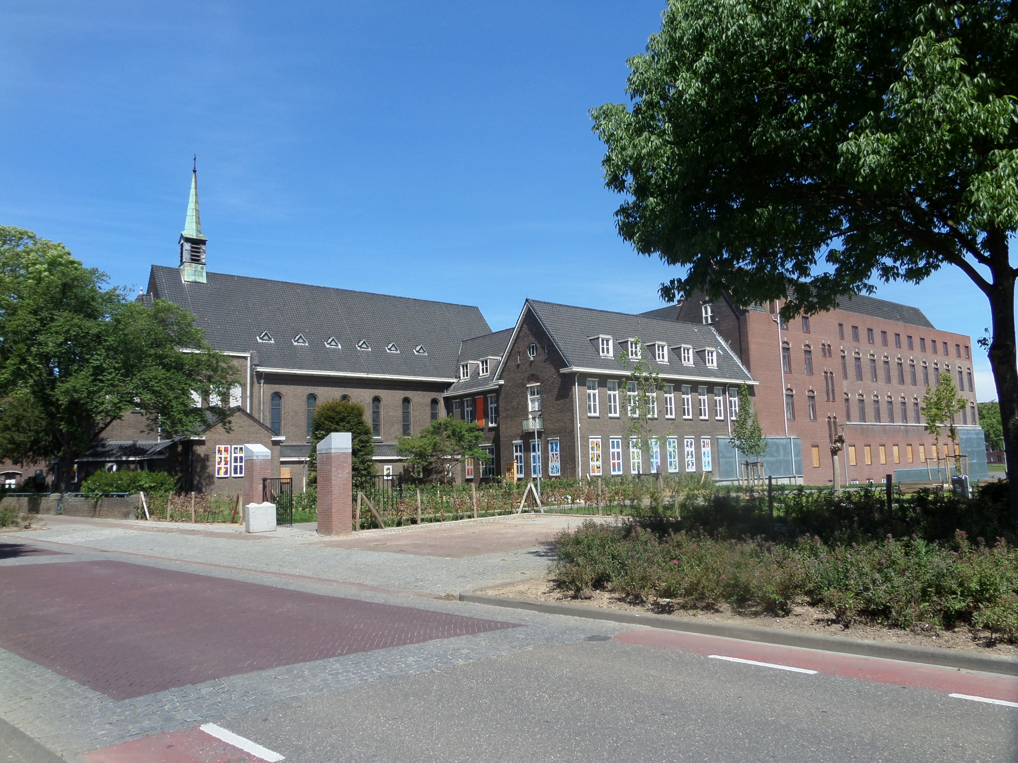 Restanten van het Maaslandziekenhuis (Frans Klooster) aan de Walramstraat 23 te Sittard